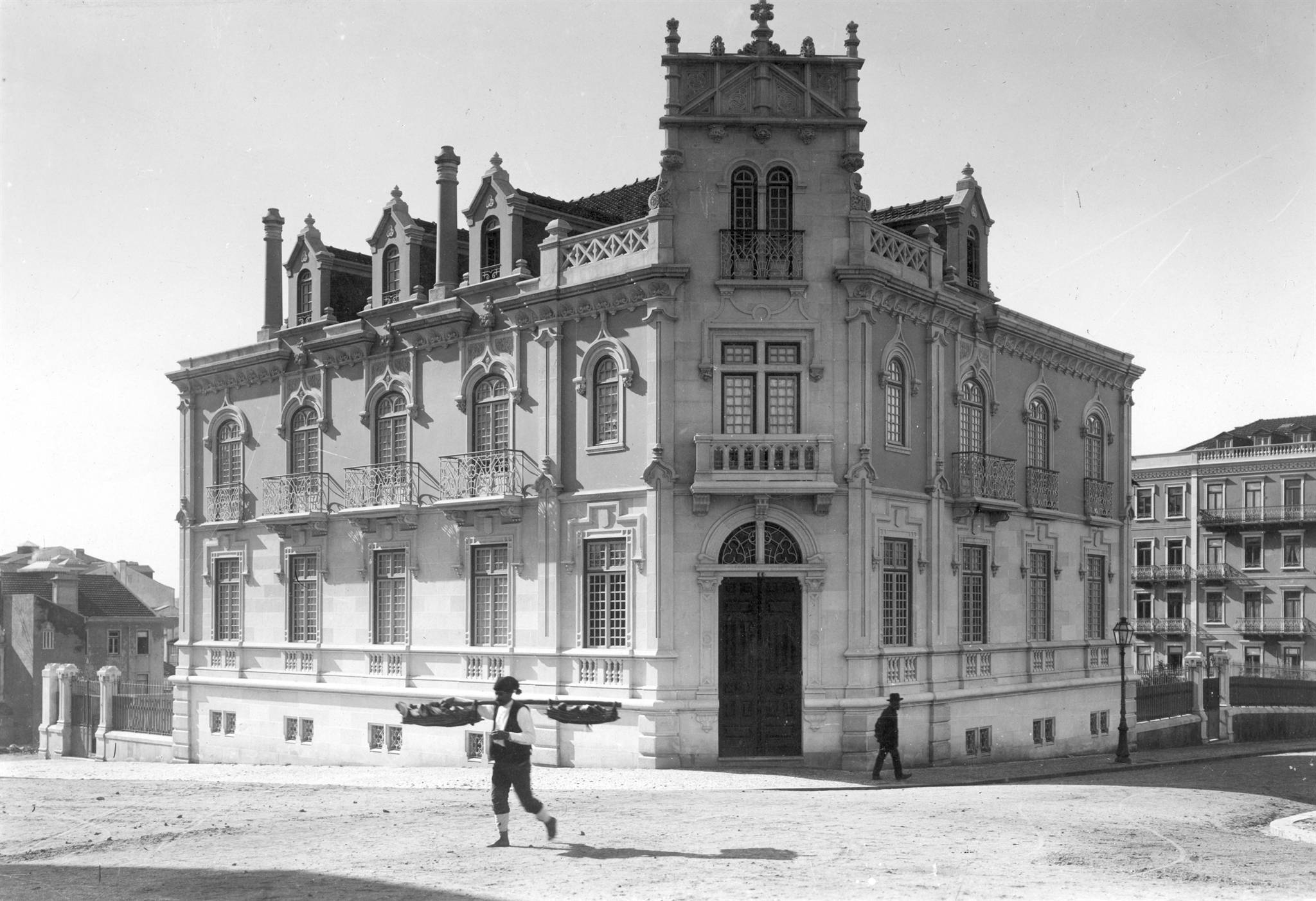 Palacete Empis, prémio Valmor de 1907 [c. 1907] Negativo de gelatina e prata em poliéster, 13 x 18 cm